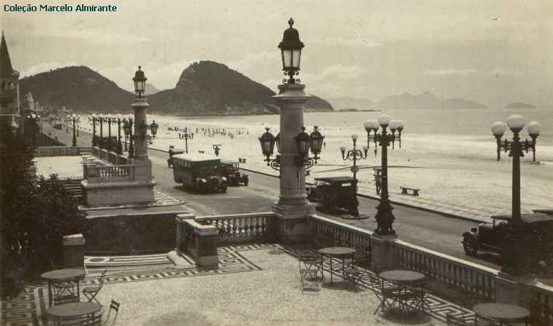 Avenida Atlântica, em frente ao Copacabana Palace na década de 30